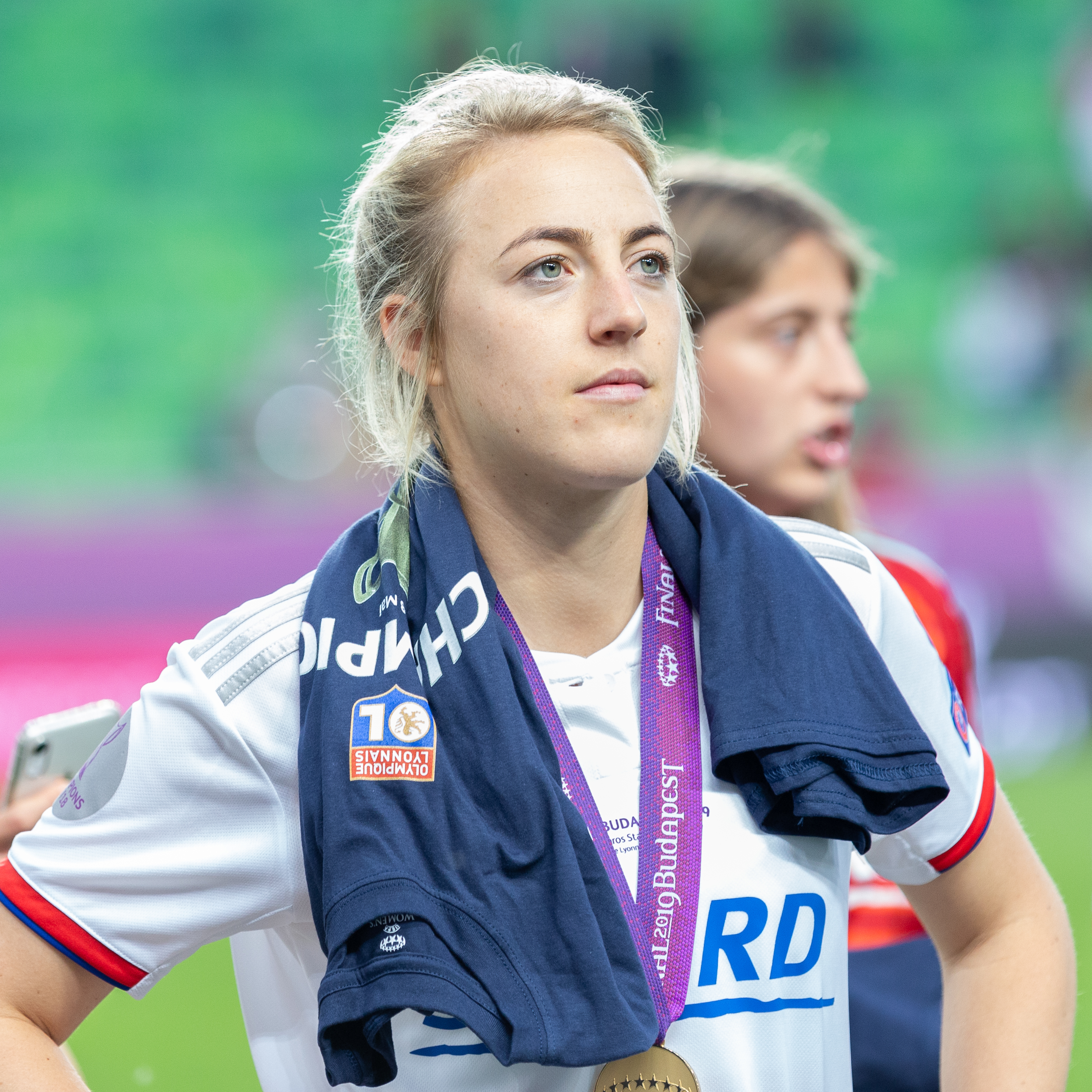 Fußball, Frauen, UEFA Women's Champions League, Olympique Lyonnais - FC Barcelona; Carolin Simon (Olympique Lyon, 26) mit der Goldmedaille; Porträt